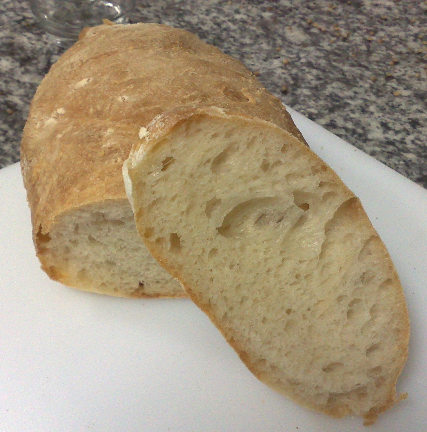 Foto do pão ciabatta.